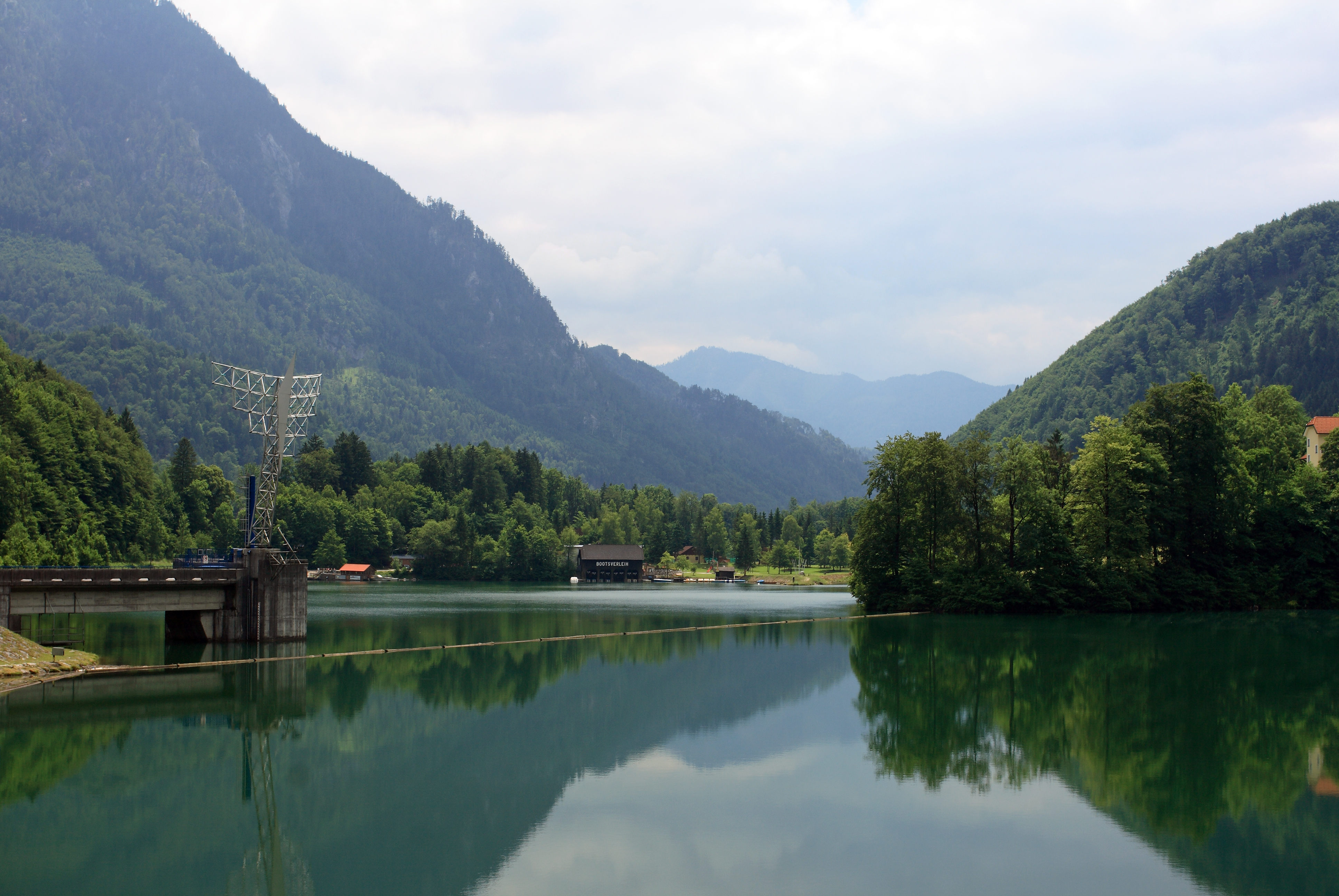 Der Stausee des Klauser Kraftwerkes